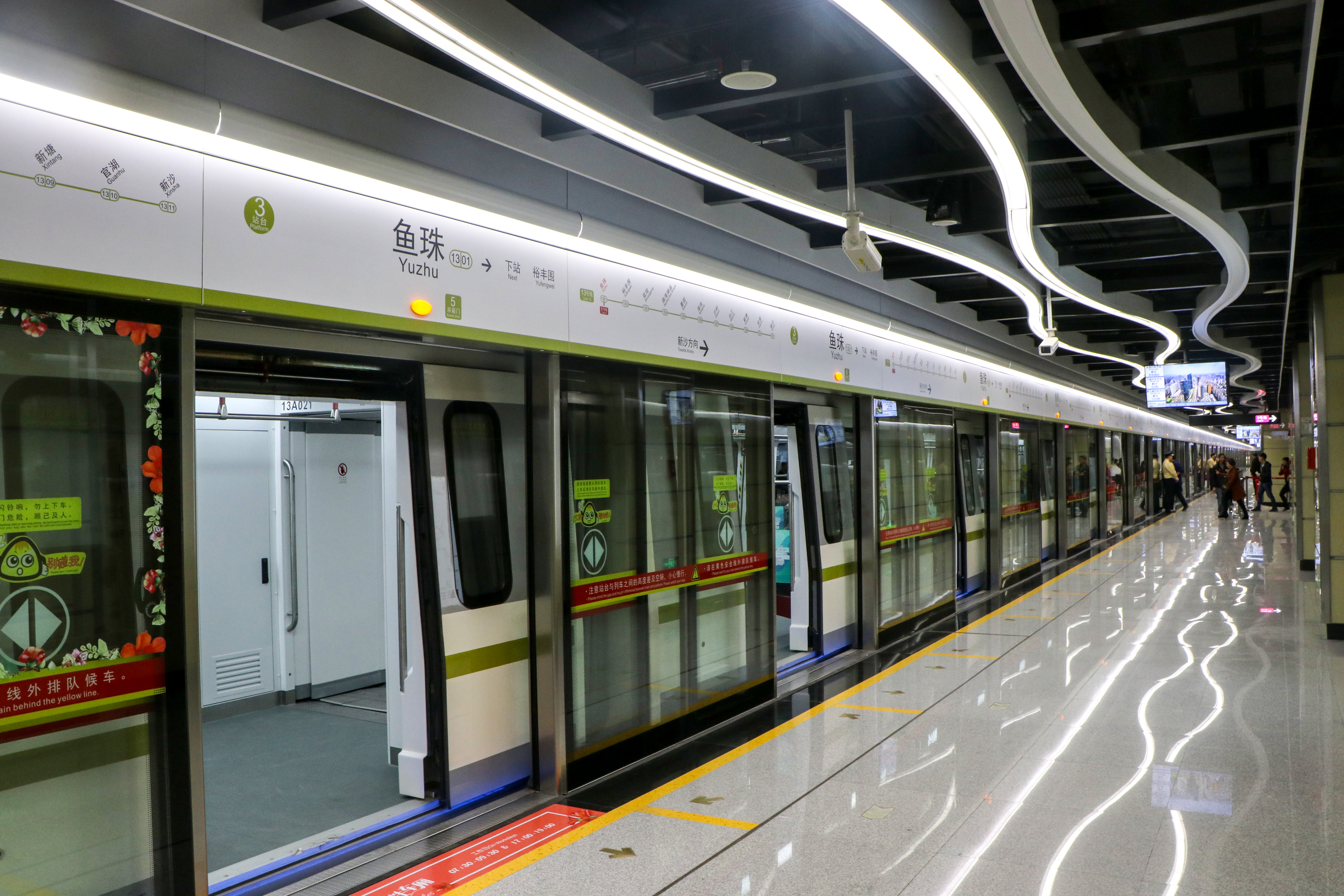 广州地铁鱼珠站